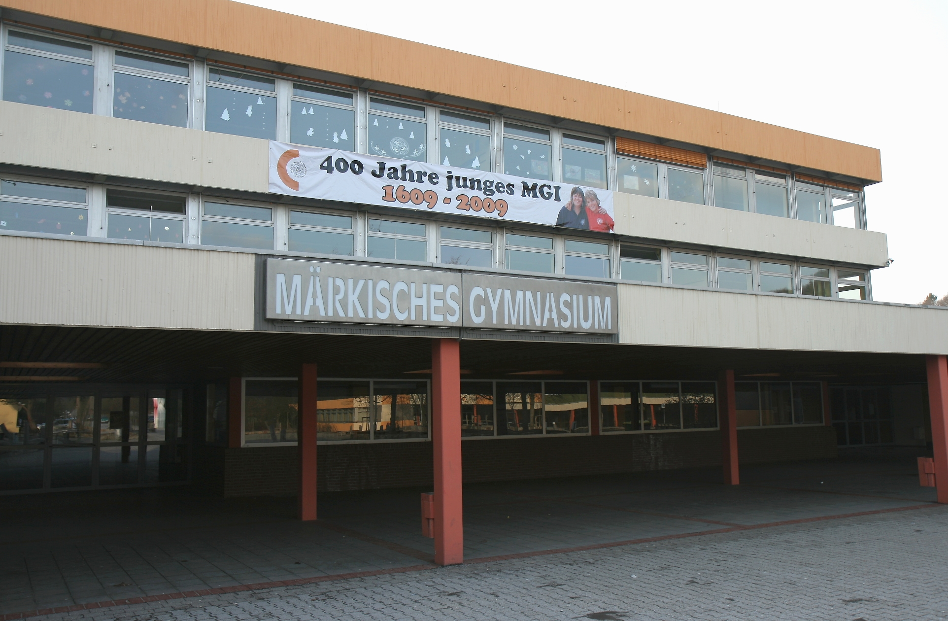 Märkisches Gymnasium Iserlohn in Iserlohn.